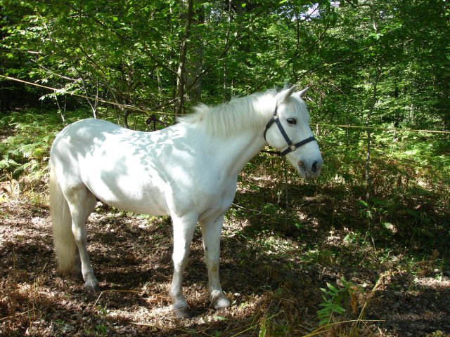 Flamenco, Camargue horse - Flamenco, cheval Camargue - autor : Laurent Nguyen - 18-sept-2005 - CC-BY-SA-2.5